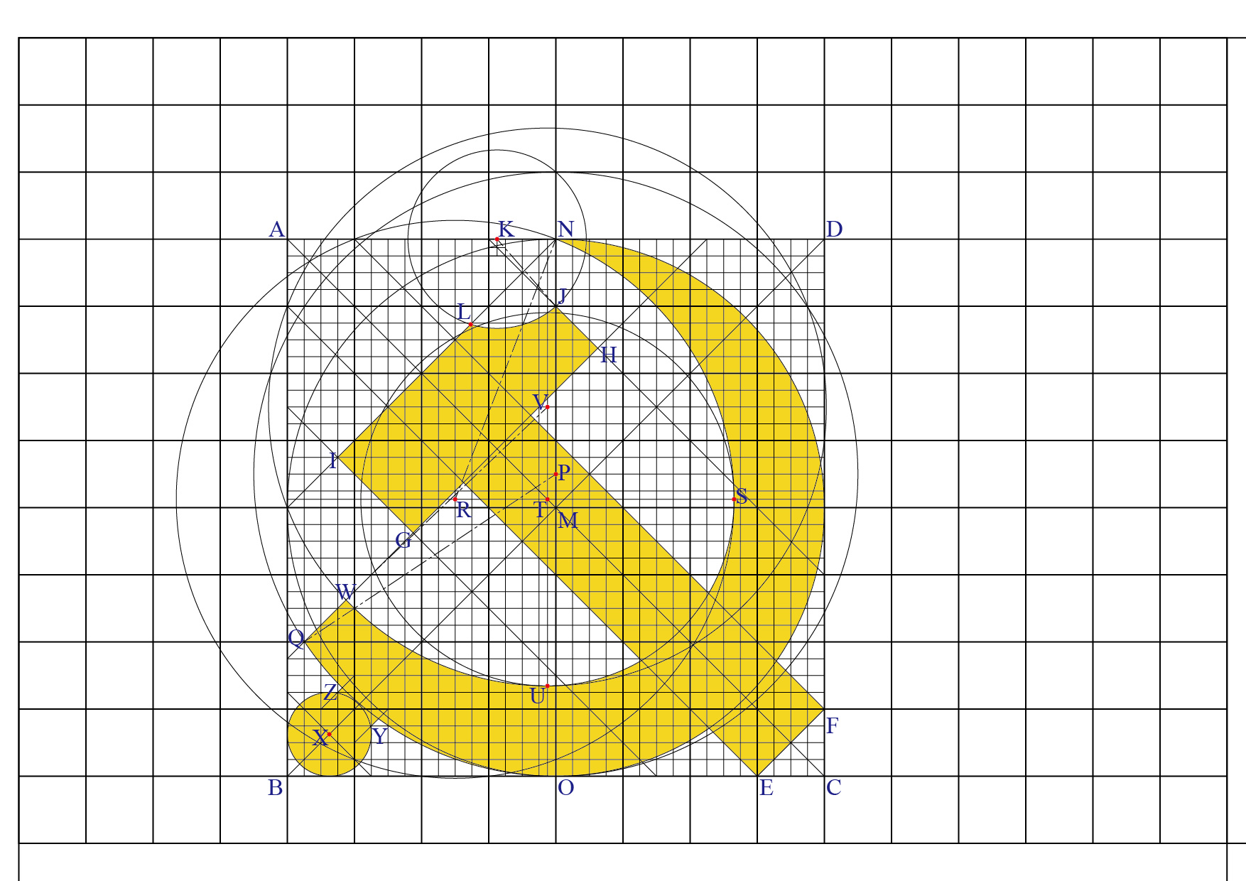 中国共产党党徽制法图示（党旗的左上四分之一部分）